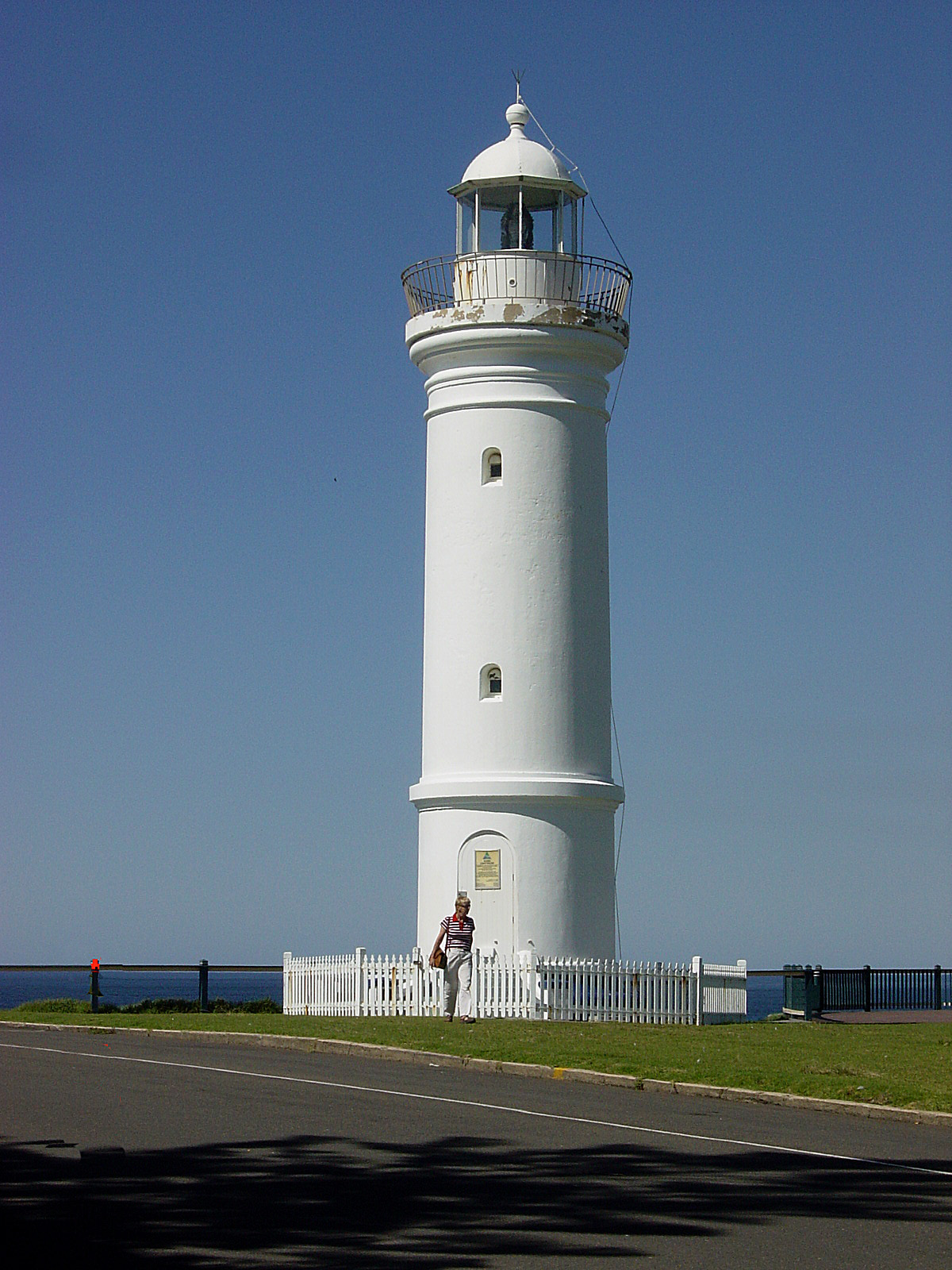 Latarnia w Kiama 15,5m. W pobliżu gejzer morski (blowhole)